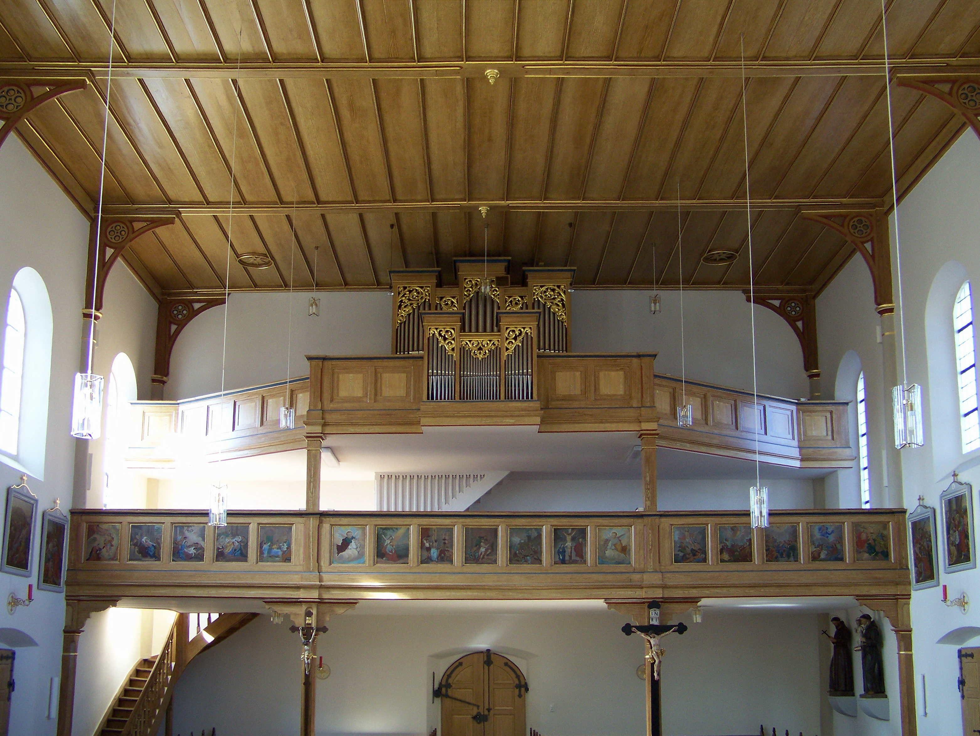 Hofkirchen 77. Katholische Pfarrkirche St. Petrus. Saalkirche im neuromanischen Stil, erbaut 1863/64, südwestlich Turm mit Putzgliederung und Spitzhelm, Turmunterbau spätgotisch; mit Ausstattung. Das Kirchenschiff ist flach gedeckt und durch halbrunde Wandpfeiler gegliedert. An den Seiten befindet sich der Kreuzweg. An der Emporenbrüstung sind die 15 Rosenkranzgeheimnisse bildlich dargestellt. Die Jann Orgel auf der oberen Empore wurde 1987 eingeweiht.